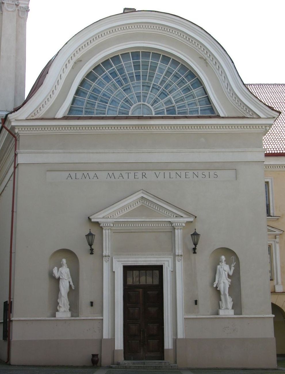 Vilnius, Litauen: Aula der Universität.